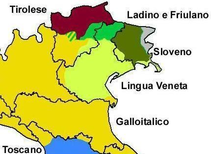 Dettaglio estratto da File Italy - Forms of Dialect inserito il 20 apr 2011 da utente Archeo